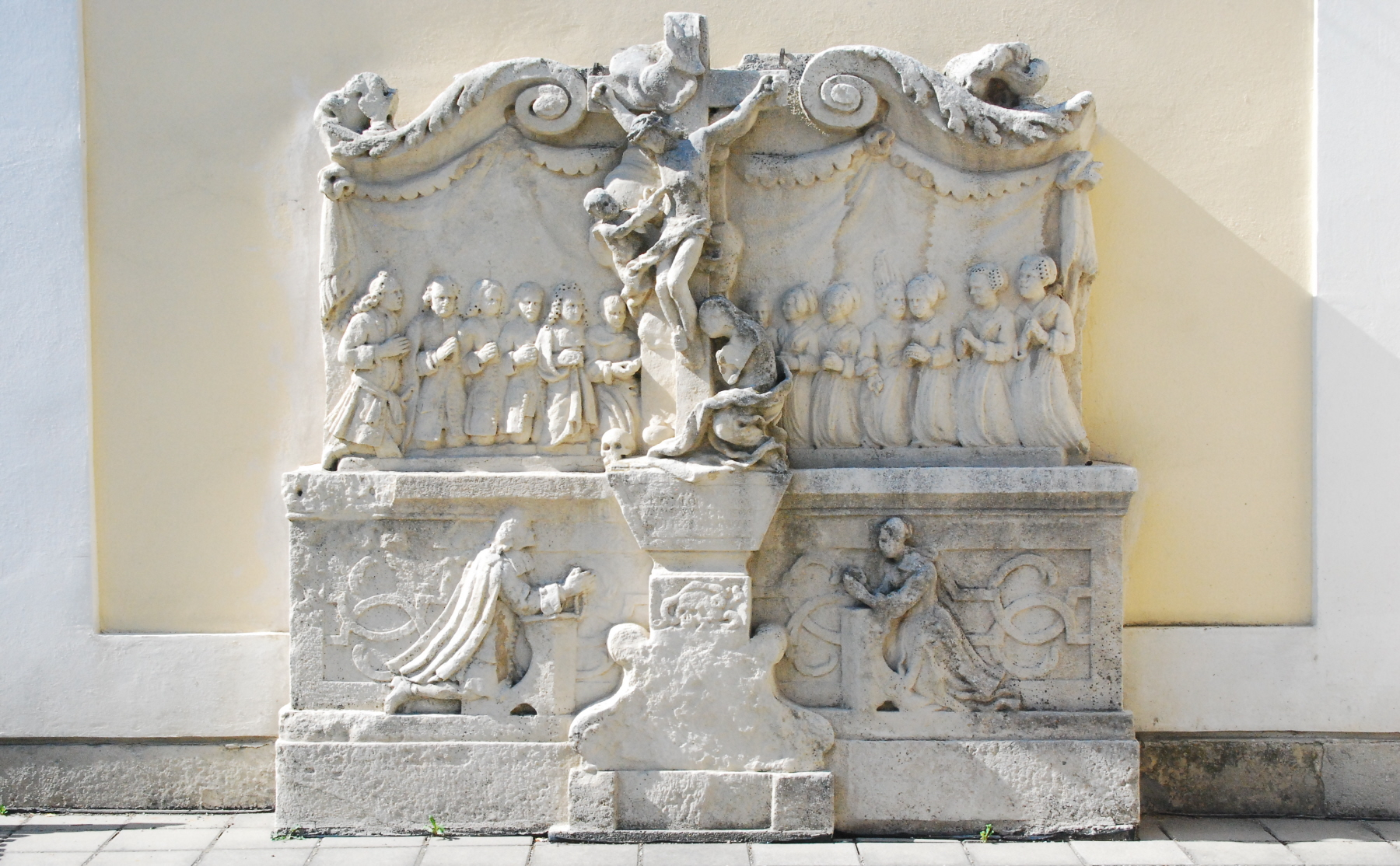 Grabstein zwischen Kirche und Pfarrhof von Göllersdorf in Niederösterreich